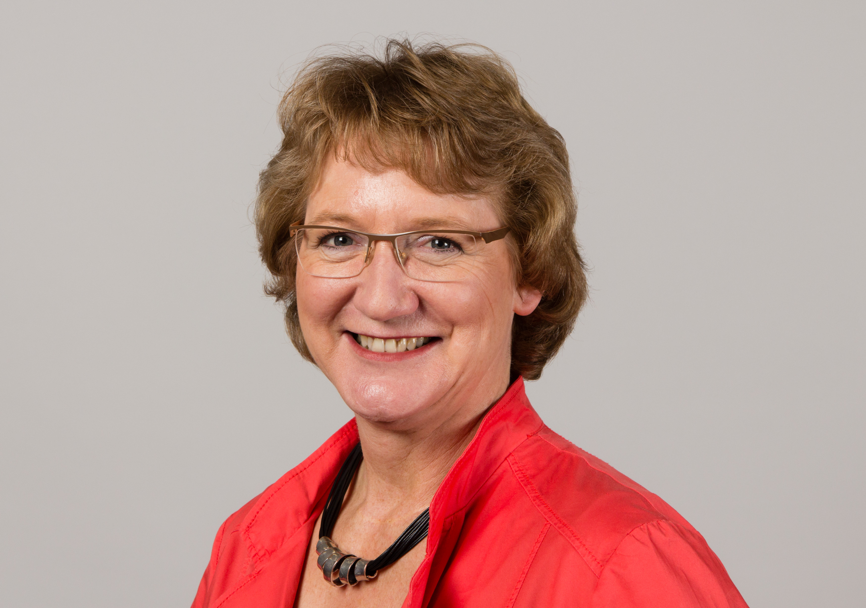 Ingrid Pahlmann (* 1. Dezember 1957 in Gifhorn) ist eine deutsche Politikerin (CDU). Bei der Bundestagswahl 2013 wurde sie zum Mitglied des Deutschen Bundestages gewählt. Wikipedia-Bundestagsprojekt 2014 8–12 September 2014 in BerlinThis file was taken during the project “Wiki loves parliaments/Bundestag 2014” (German). Organisation: Martin Rulsch, Olaf KosinskyDesign: Martin KraftPhotography: Foto-AG Gymnasium Melle (Jan-Kristof Blömke, Lukas Eismann, Moritz Kosinsky, Laura Lessing, Karsten Mosebach, Mascha Mosebach, Teresa Schreer, Noah Sewöster, Niklas Tschöpe), Olaf Kosinsky, Martin Kraft, Harald Krichel, Steffen Prößdorf, Ralf Roletschek, Martin Rulsch, Gerd Seidel, Sven TeschkeVideo: Marc Rudnick, Manuel SchneiderEditors: Marcus Cyron, Günter Fremuth, Martin Kraft, Robin Krahl, Harald Krichel, Martin Rulsch, WikiAnikaReception: DasMonstaaa, Leonie Rabea Große, Lutheraner, Nina Möllering, Martin Rulsch, WikiAnika, Foto-AG Gymnasium MelleCosmetics: Regina Bosak, Bettina Dieguez, Sandra Kobbe, Andrea Strehlke; Irada Abdullayeva, Vivien Abelmann, Olena Engelbrecht, Sarah Fabini, Nina Magnus, Jacqueline Schmidt, Leonie Taboada, Julia Willer Usage information If you need more information how to use this file, please send an email to . Personality rights warningAlthough this work is freely licensed or in the public domain, the person(s) shown may have rights that legally restrict certain re-uses unless those depicted consent to such uses. In these cases, a model release or other evidence of consent could protect you from infringement claims.